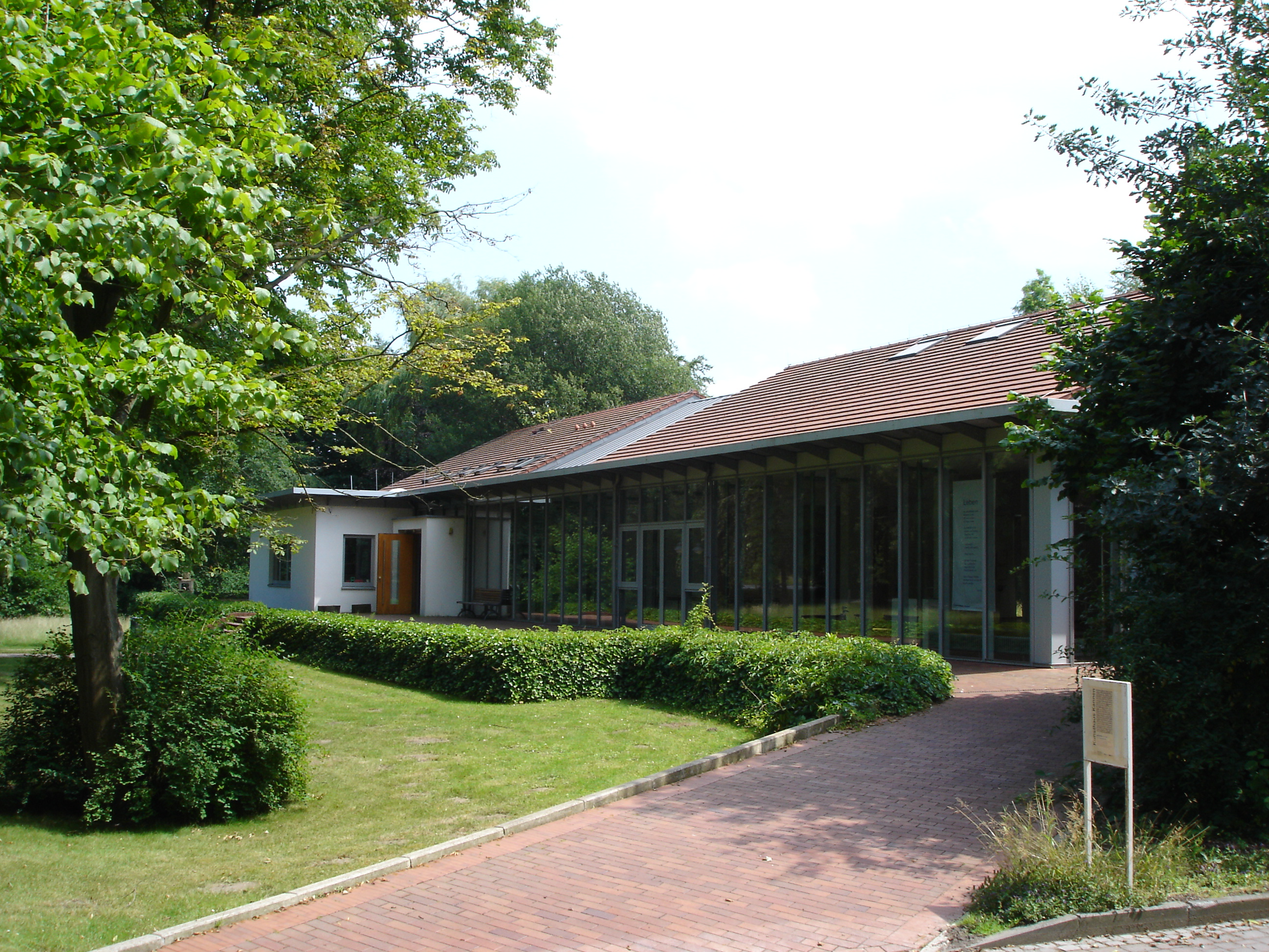 Kunsthaus Kannen in Münster, Westfalen, Deutschland